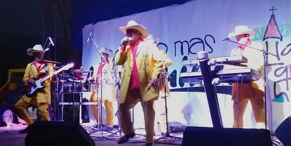 Los Gatos Negros de Traiguén, Concierto en Llanquihue